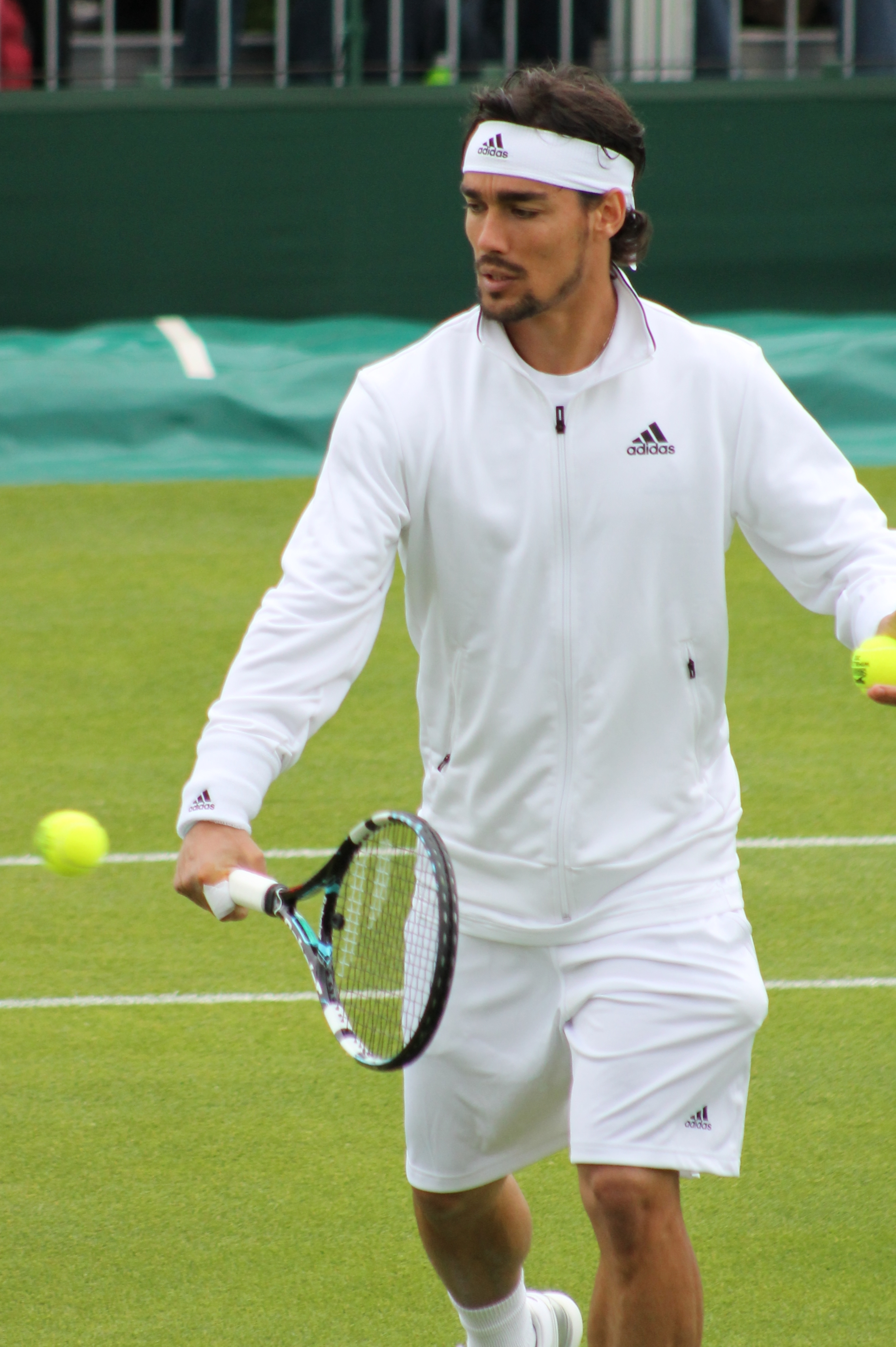 Fognini WM13